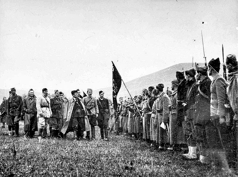 Srpskohrvatski / српскохрватски: Tito vrši smotru Prve proleterske brigade 7. novembra 1942. godine u Bosanskom Petrovcu.